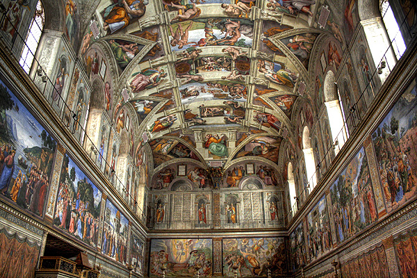 Sixtinische Kapelle / Capella Sistina